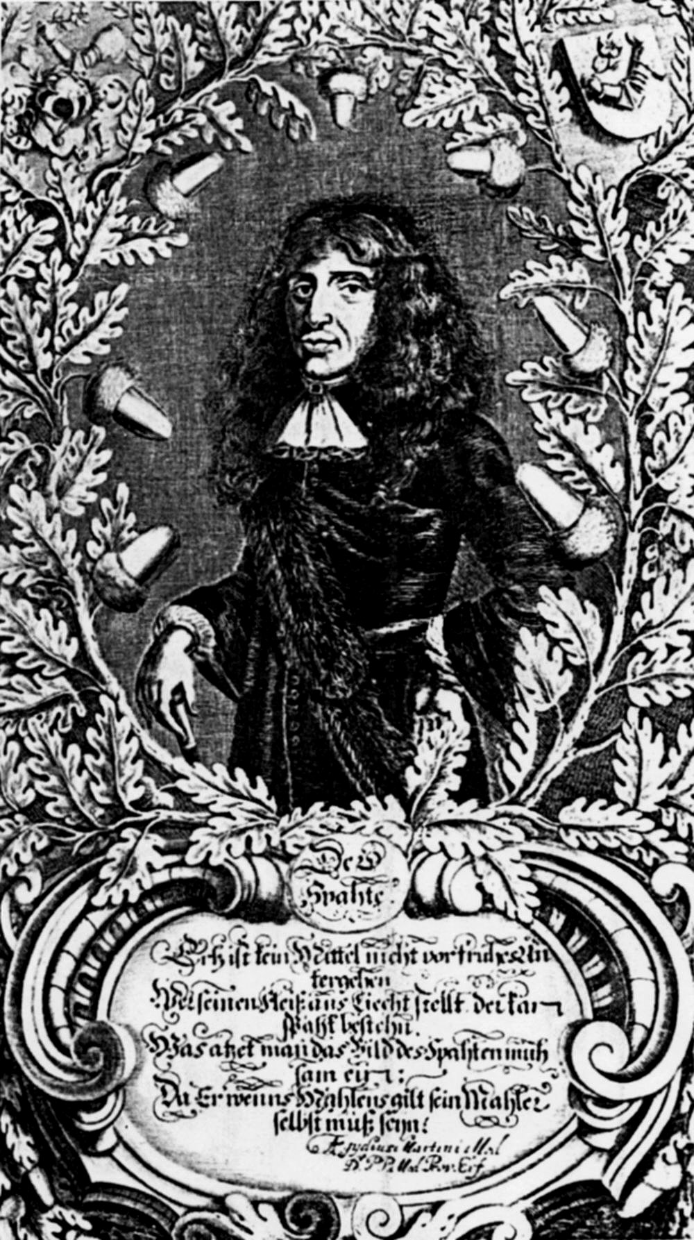 Kaspar von Stieler (1632–1707), Sprachwissenschaftler und Autor des Barock (Kupferstich)